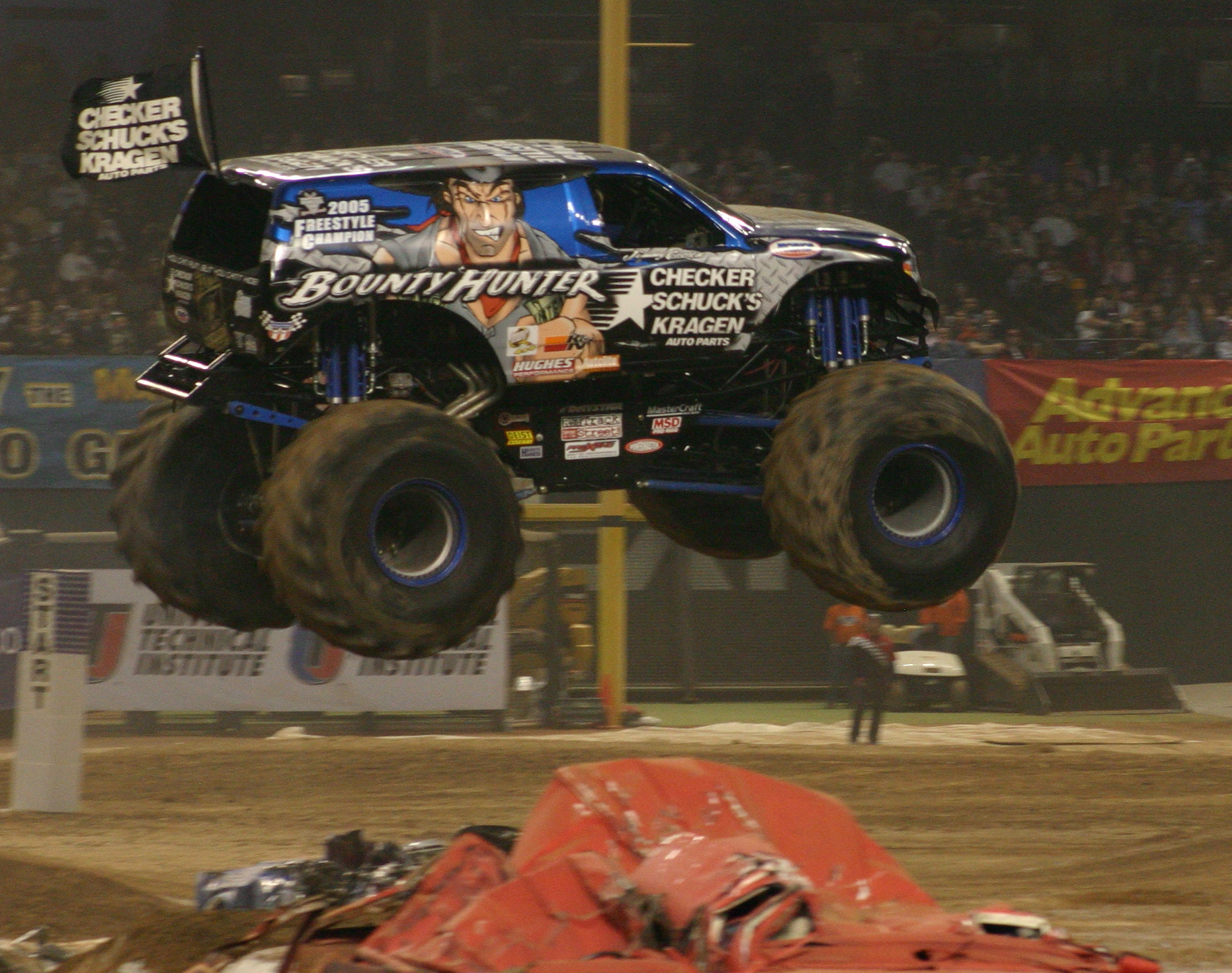 Taken by Jot Powers, 1/2006